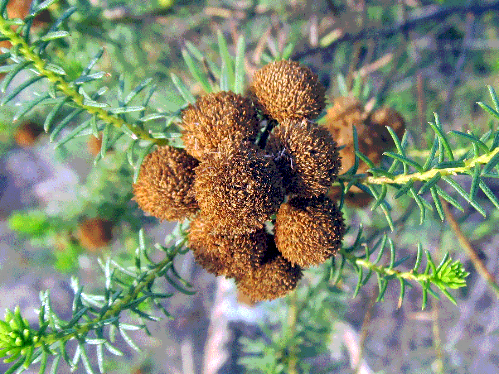 Frutos de Heterotalamus alienus. En Los Chañares de Tanti, Córdoba, Argentina. Región Chaco Seco Serrano.